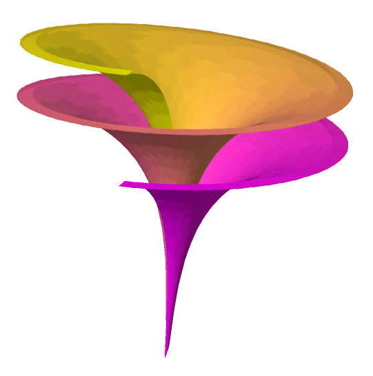 image de la surface de Dini, par SageMath cf = lambda u,v: (u/4/pi).n cm = colormaps.spring P = ParametrizedSurface3D((cos(u)*sin(v),sin(u)*sin(v),cos(v)+log(tan(v/2))+.15*u),((u,0,4*pi),(v,0,2)),color=(cm,cf)) P.plot(color=(cf,cm),plot_points=130,frame=False)